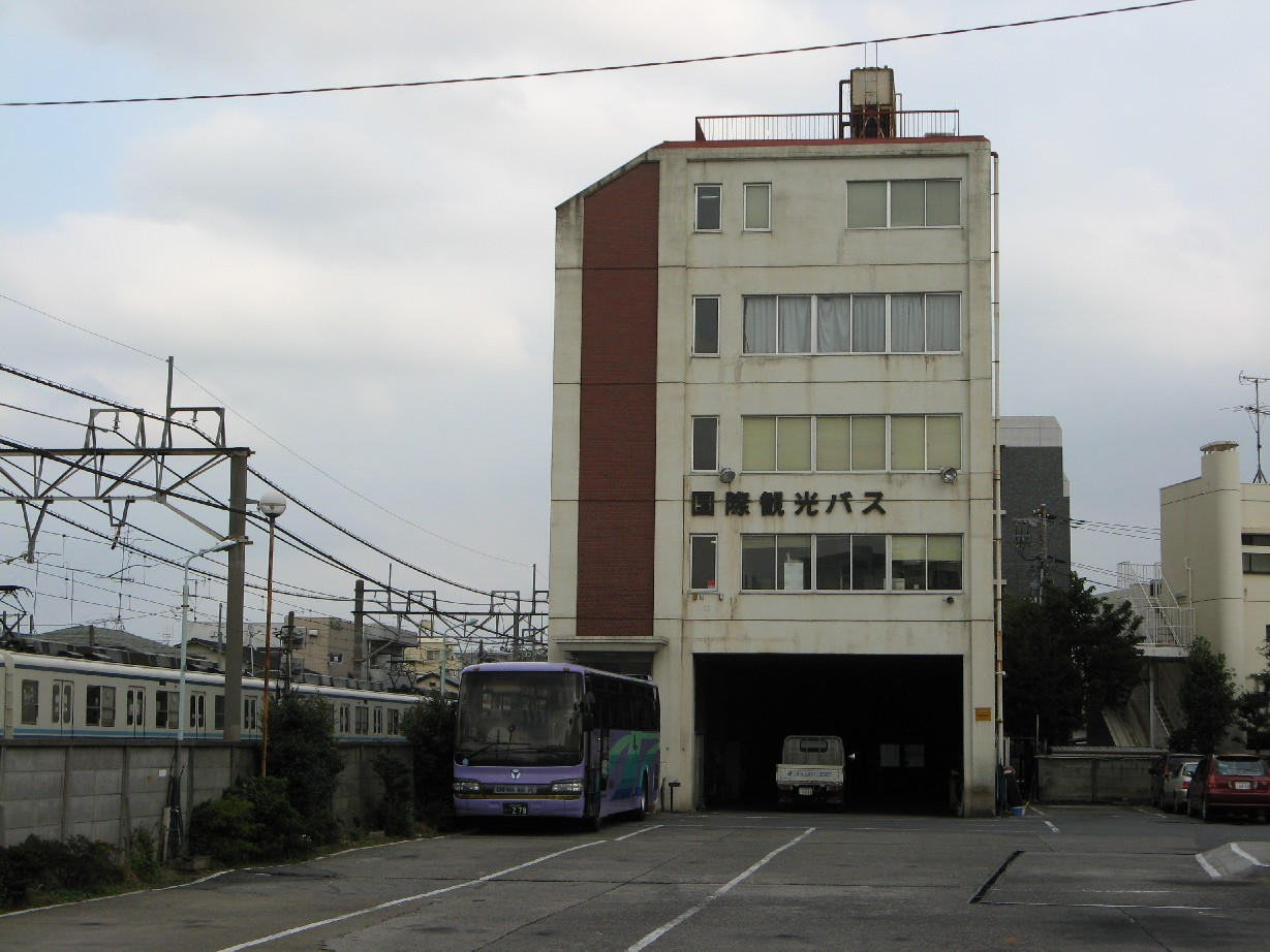 国際観光バス本社。敷地外より撮影。